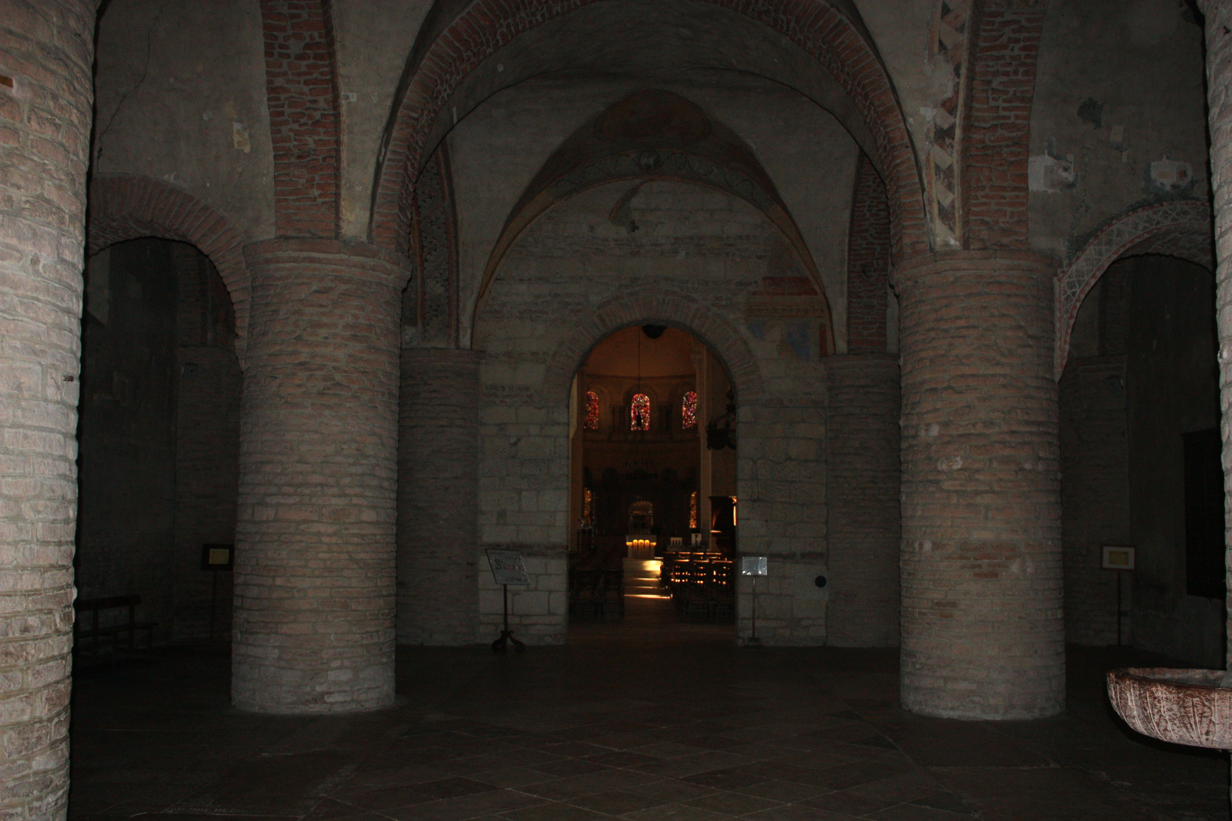 Le narthex qui acceuille les fidèles est toujours sombre : symbole du réconfort que l'on trouvera dans la prière, on y passe de l'ombre à la lumière ...